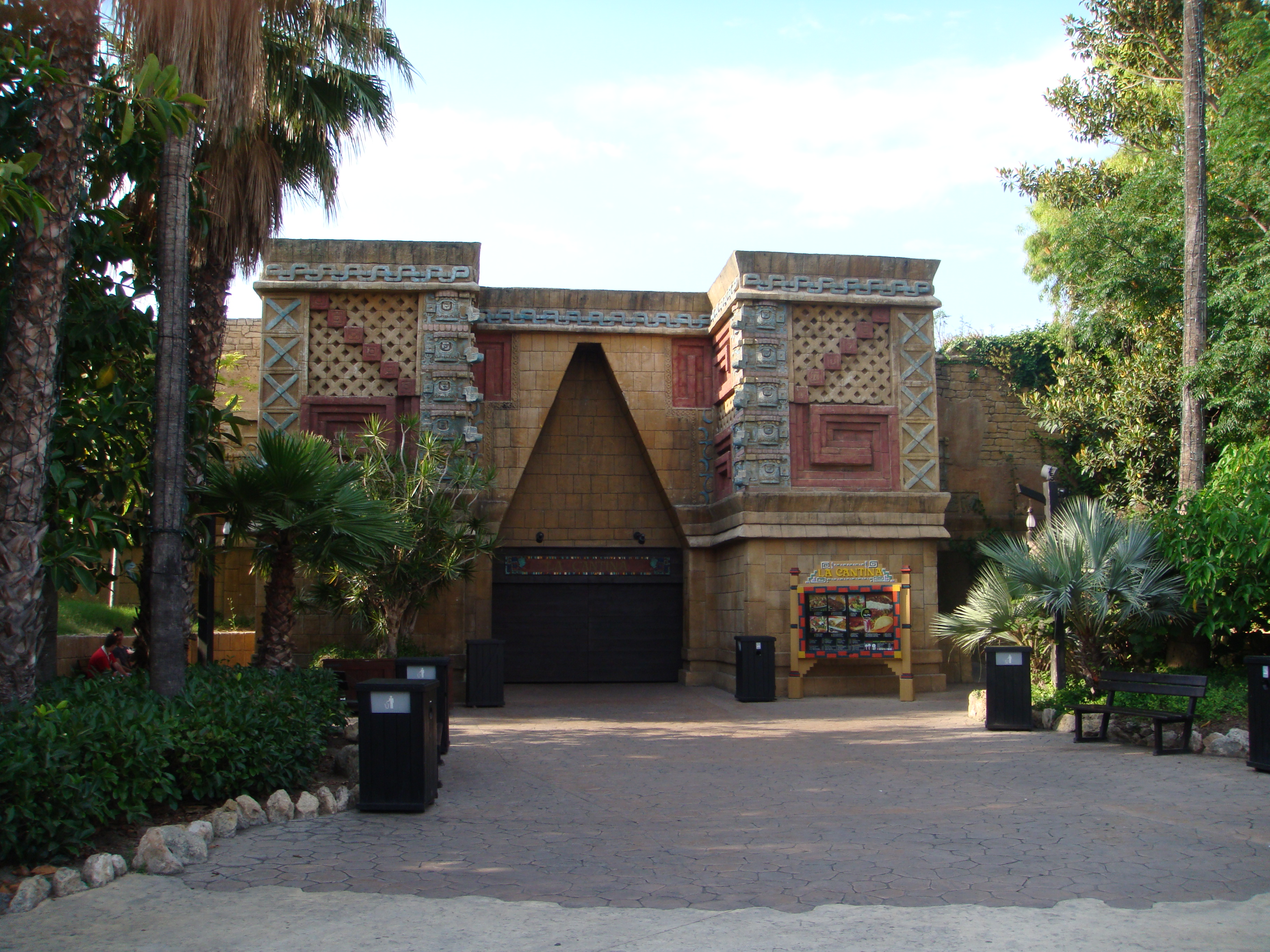 Template:La Cantina